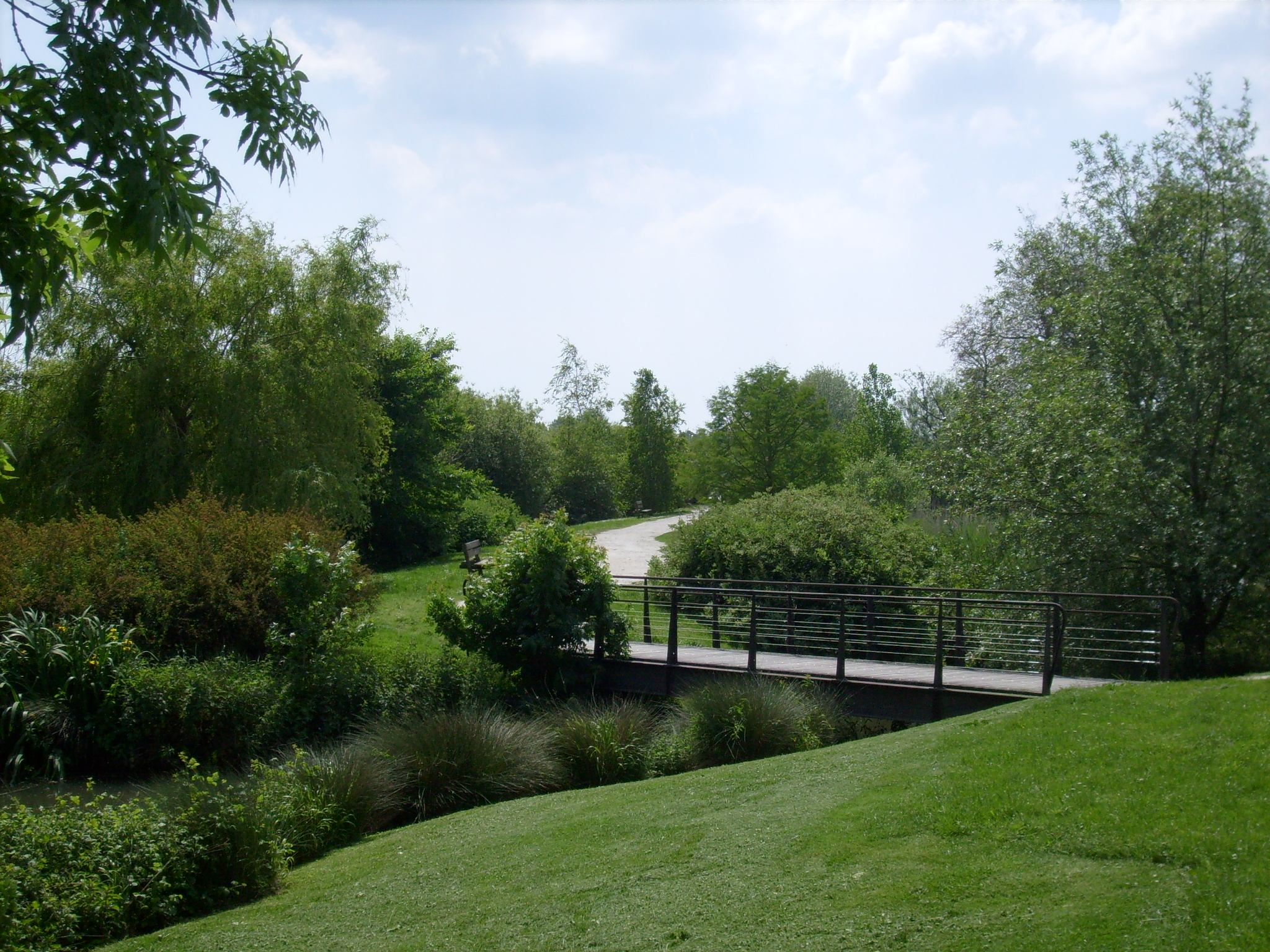 parc de vaux sur mer, charente-maritime